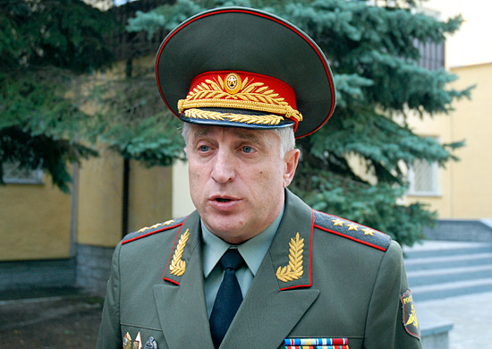 Главнокомандующий Сухопутными войсками генерал-полковник Александр Постников